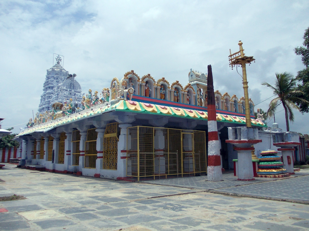 మాచర్ల (పల్నాడు) పట్టణంలోని శ్రీ లక్ష్మీ చెన్నాకేశవ స్వామి దేవాలయం